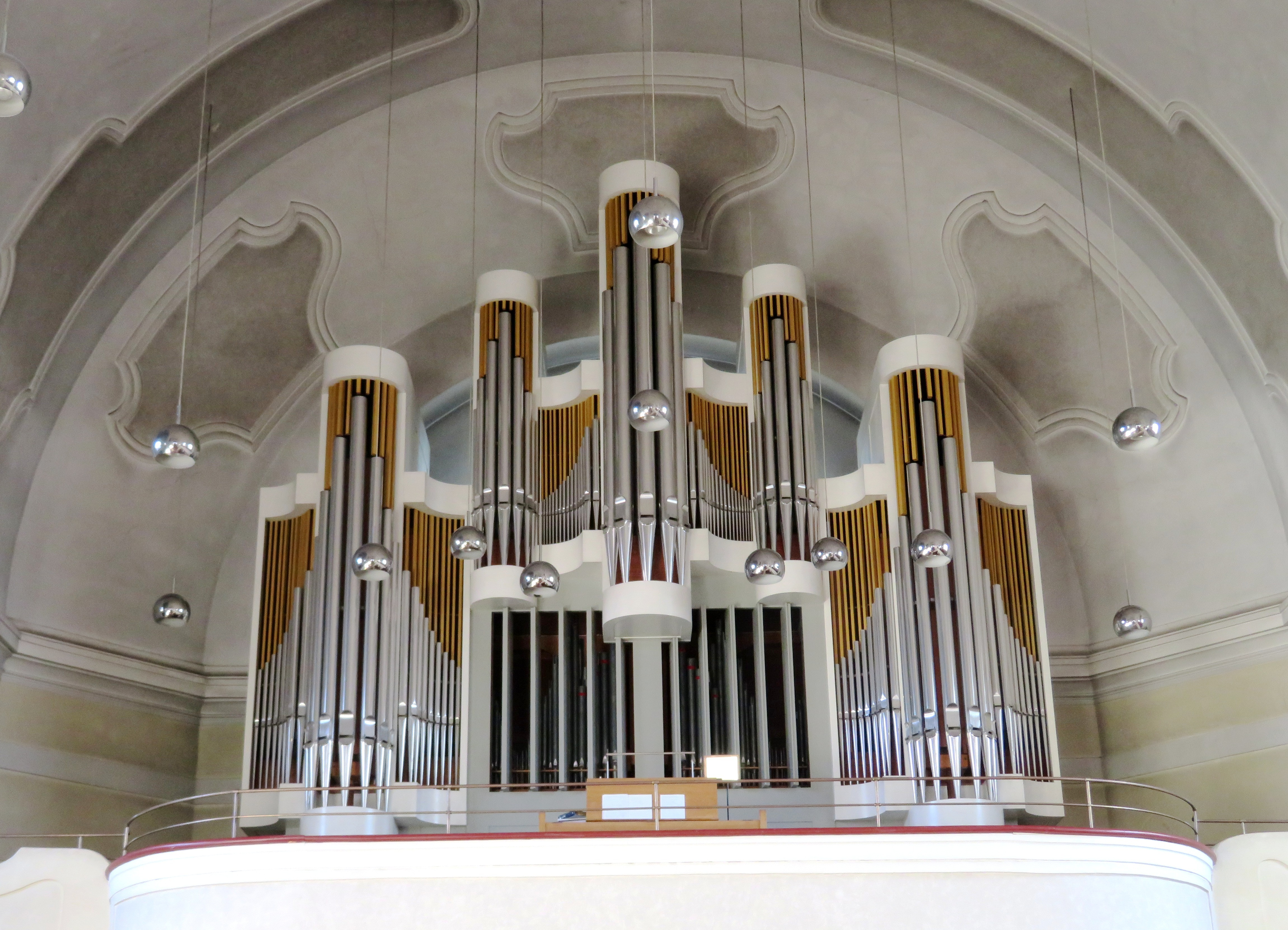 Hauptorgel der evang.-luth. Himmelfahrtskirche München-Pasing, erbaut von Orgelbau Klais, Bonn (Opus 1604)